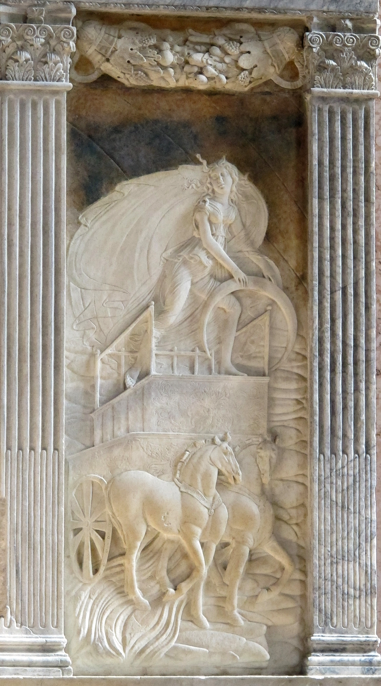 Tempio Malatestiano - MIBAC This is a photo of a monument which is part of cultural heritage of Italy.